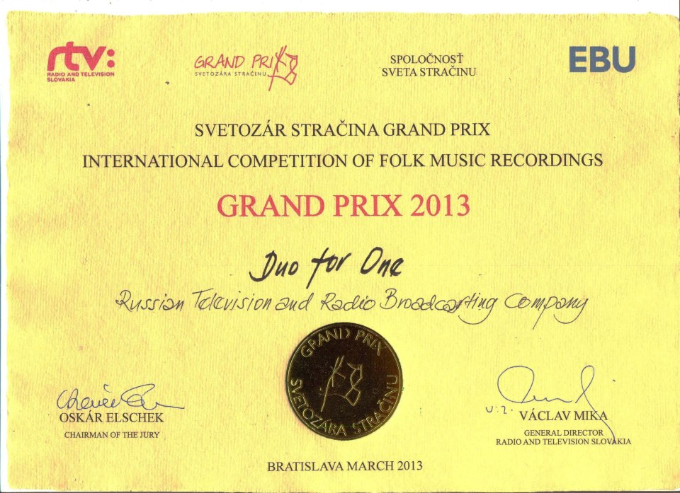 2013 - Svetozar Stracina Grand Prix - Duo for one